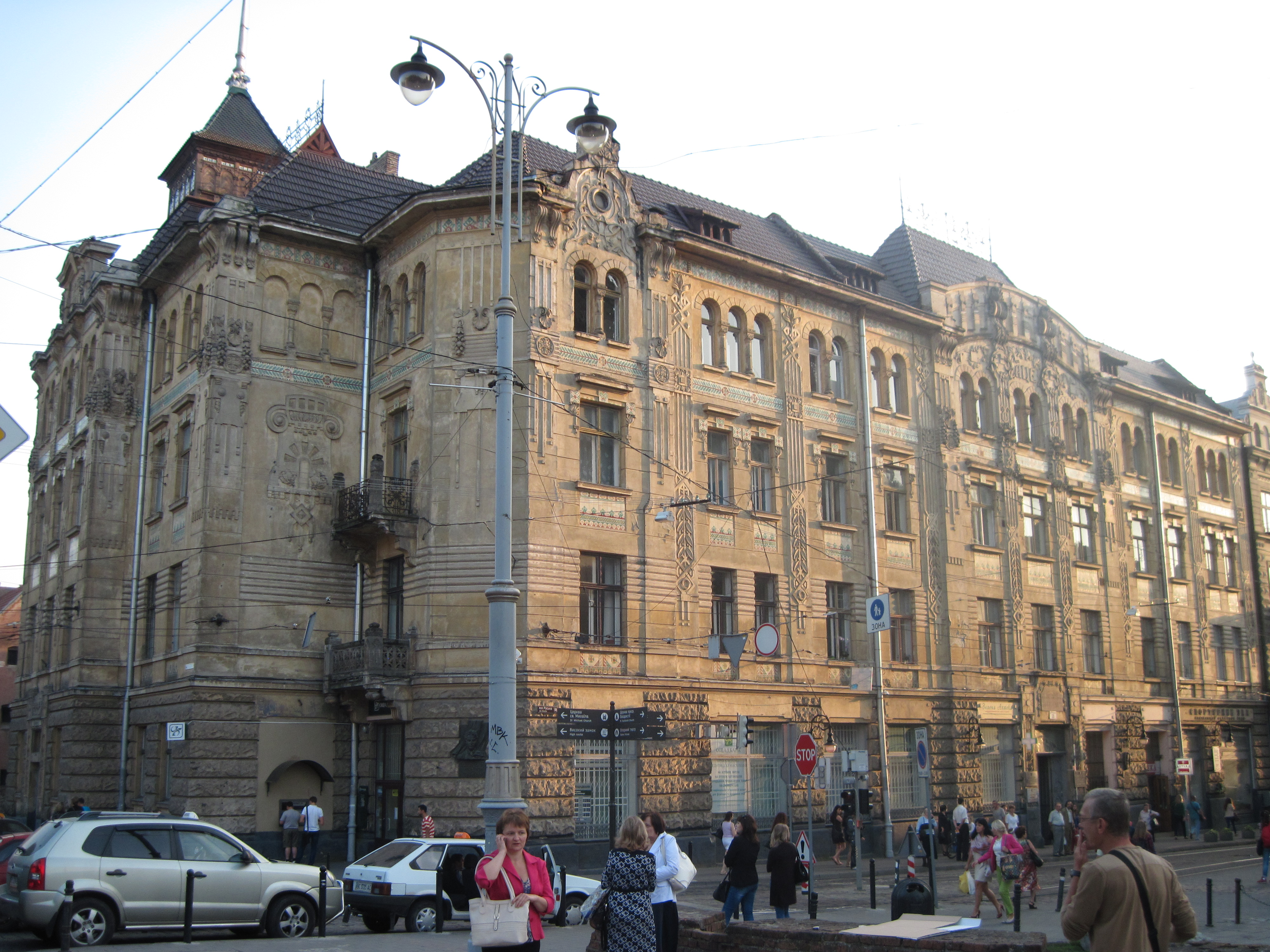 Будівля страхового товариства Дністер. Львів, 2014